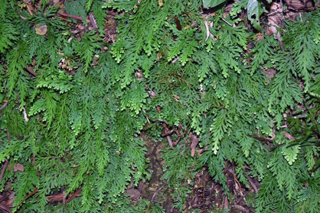 中文（台灣）: 異葉捲柏環境照